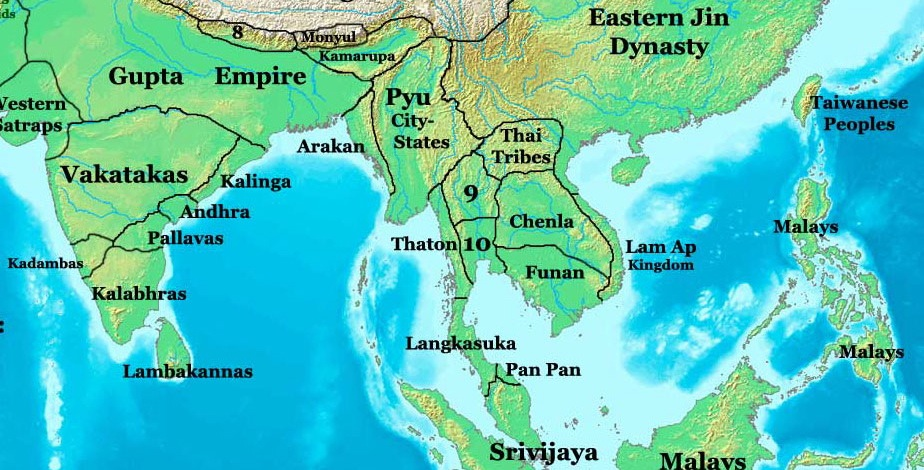 Funan and Gupta empire 400 a.d.